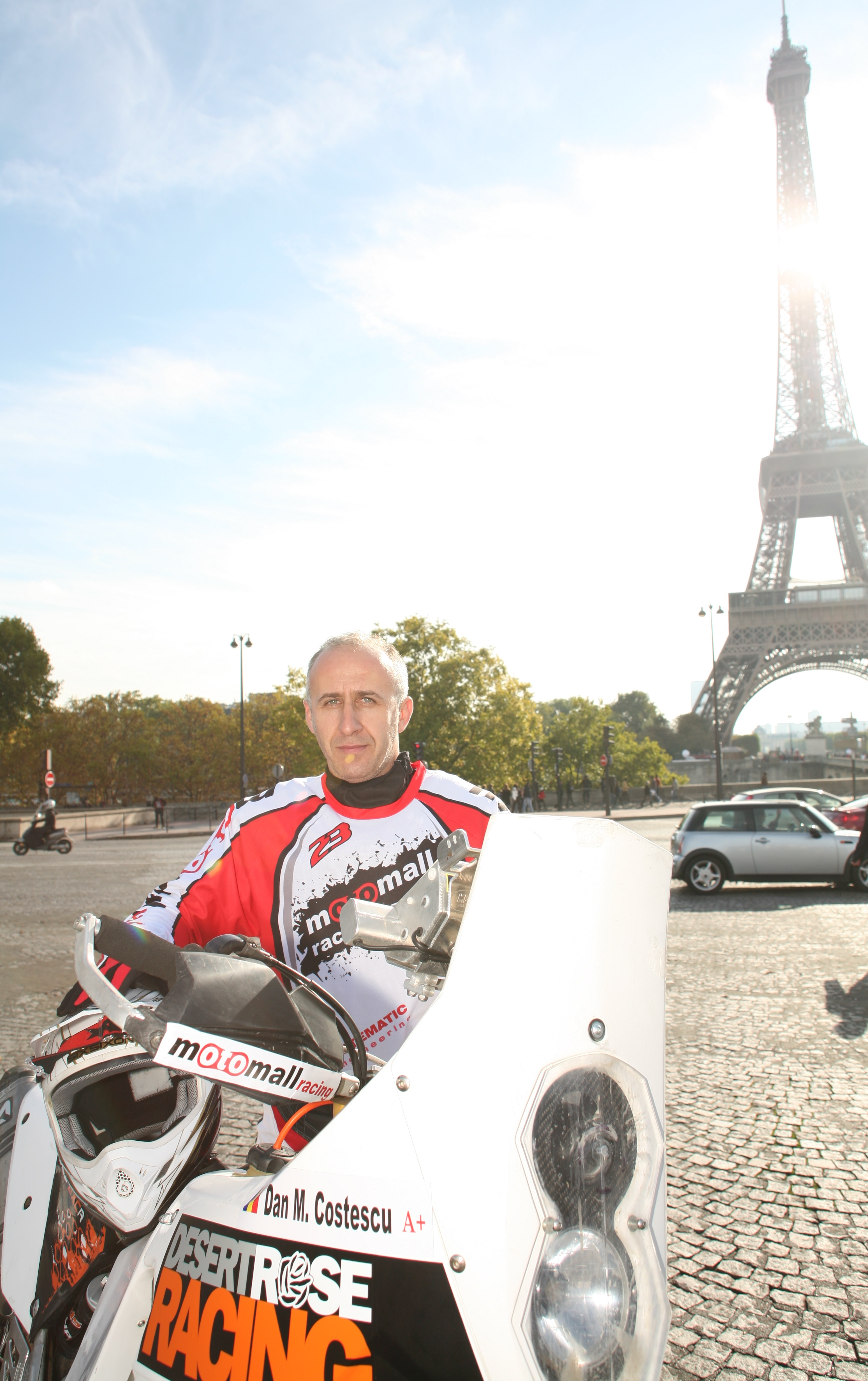 La startul Raliului Paris-Dakar "Heroes Legend"